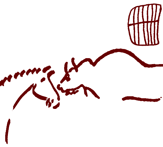 Figuras pintadas en rojo representando el esquema típico de la oposición bisonte-caballo, con un signo tectiforme (femnino? como complementario. Galería A (primer santuario) de la Cueva de La Pasiega, en el monte Castillo, localidad de Puente Viesgo (Cantabria, España)